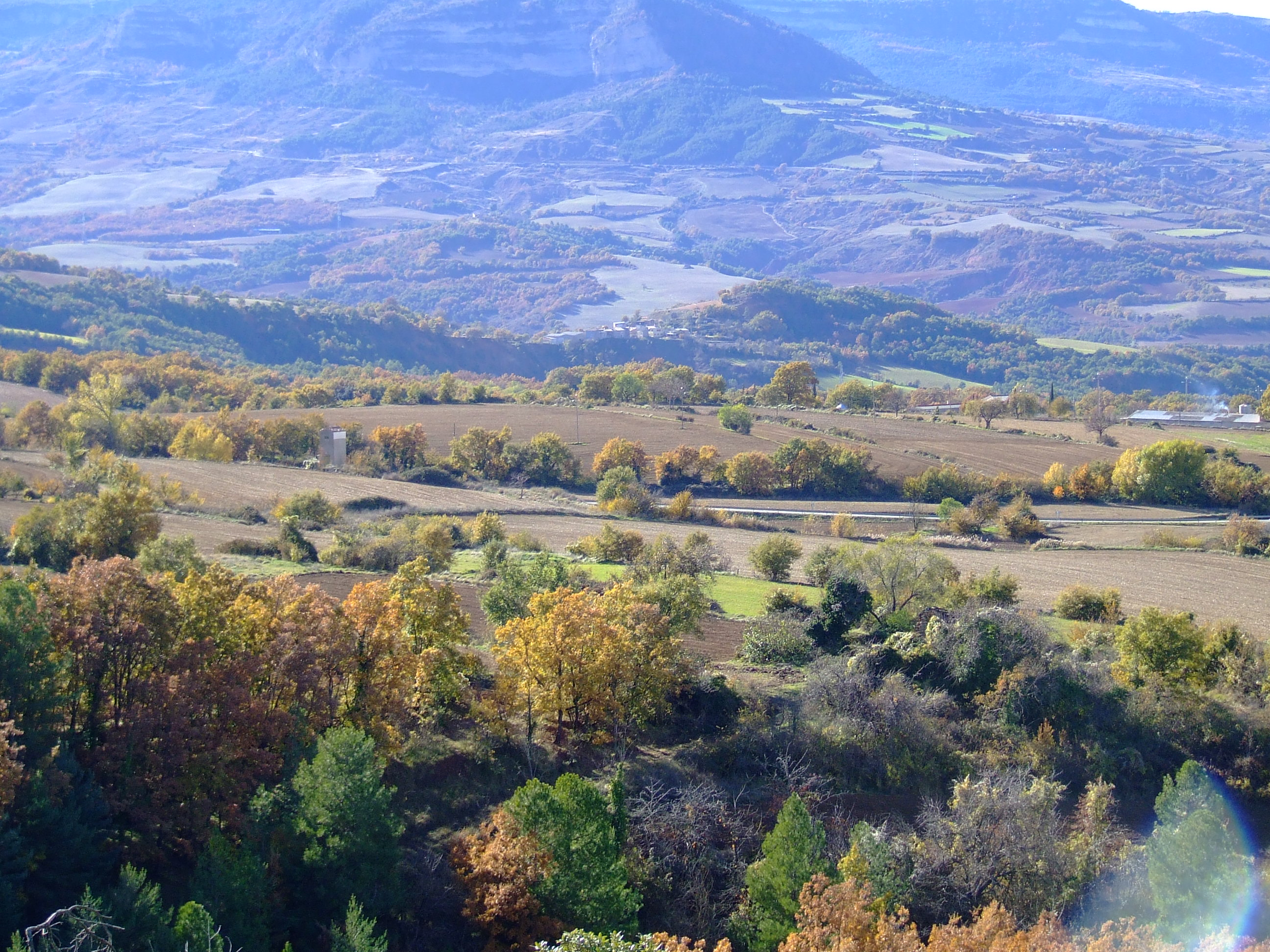 El pla de Sant Pere, a Biscarri (Benavent de la Conca, Isona i Conca Dellà, Pallars Jussà)